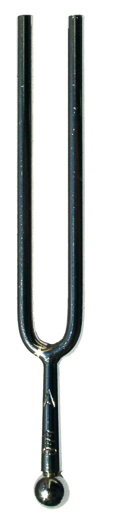 Stimmgabel, Kammerton a, 440 Hz